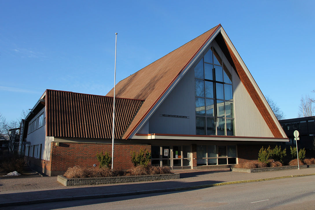 Korson helluntaiseurakunnan kirkko- ja toimitilarakennus Vantaan Metsolan kaupunginosassa.